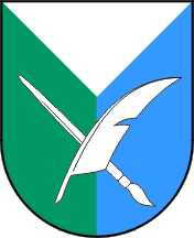 Coat of Arm of Gorenja vas-Poljane